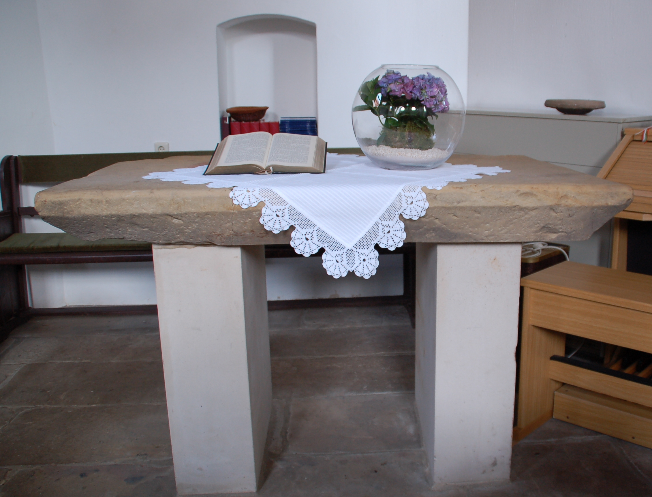 Tisch